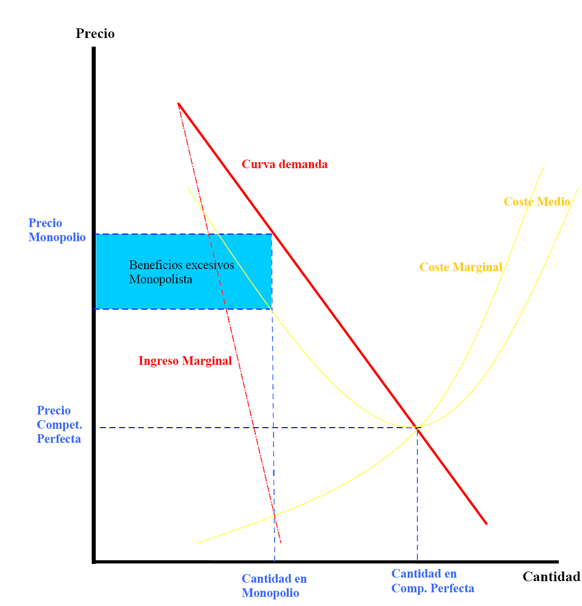 comportamiento precios competencia perfecta